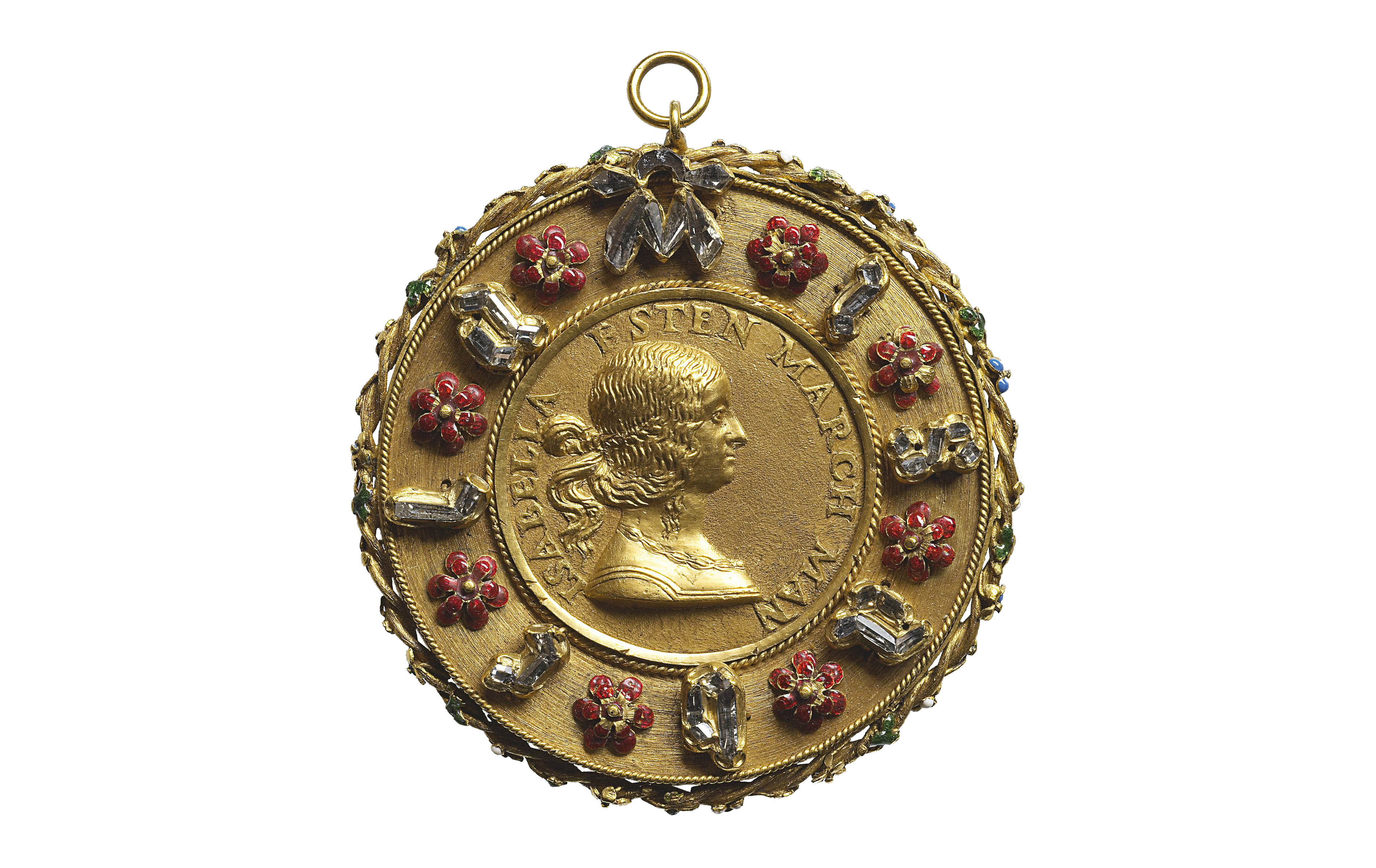 Gian Cristoforo Romano 1495 – Portraitmedaille von Isabella d’Este (Prunkversion 1505) Einzige sichere Identifizierung aufgrund bestehender Inhomogenität